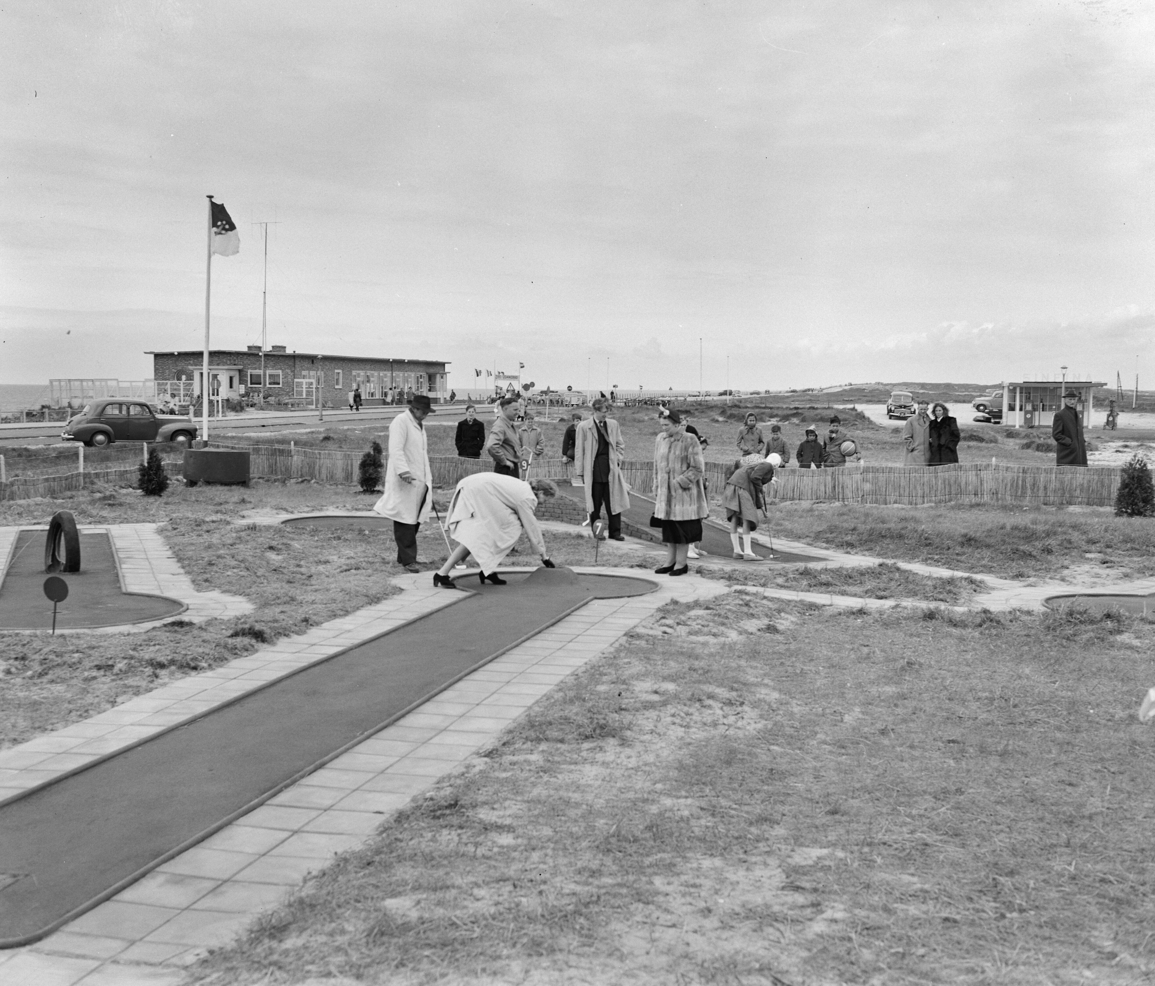 Collectie / Archief : Fotocollectie Anefo Reportage / Serie : [ onbekend ] Beschrijving : Nieuwe minigolfbaan in Zandvoort Datum : 14 mei 1951 Locatie : Noord-Holland, Zandvoort Trefwoorden : minigolf, speelplaatsen Fotograaf : Pot, Harry / Anefo Auteursrechthebbende : Nationaal Archief Materiaalsoort : Negatief (zwart/wit) Nummer archiefinventaris : bekijk toegang 2.24.01.04 Bestanddeelnummer : 904-5682